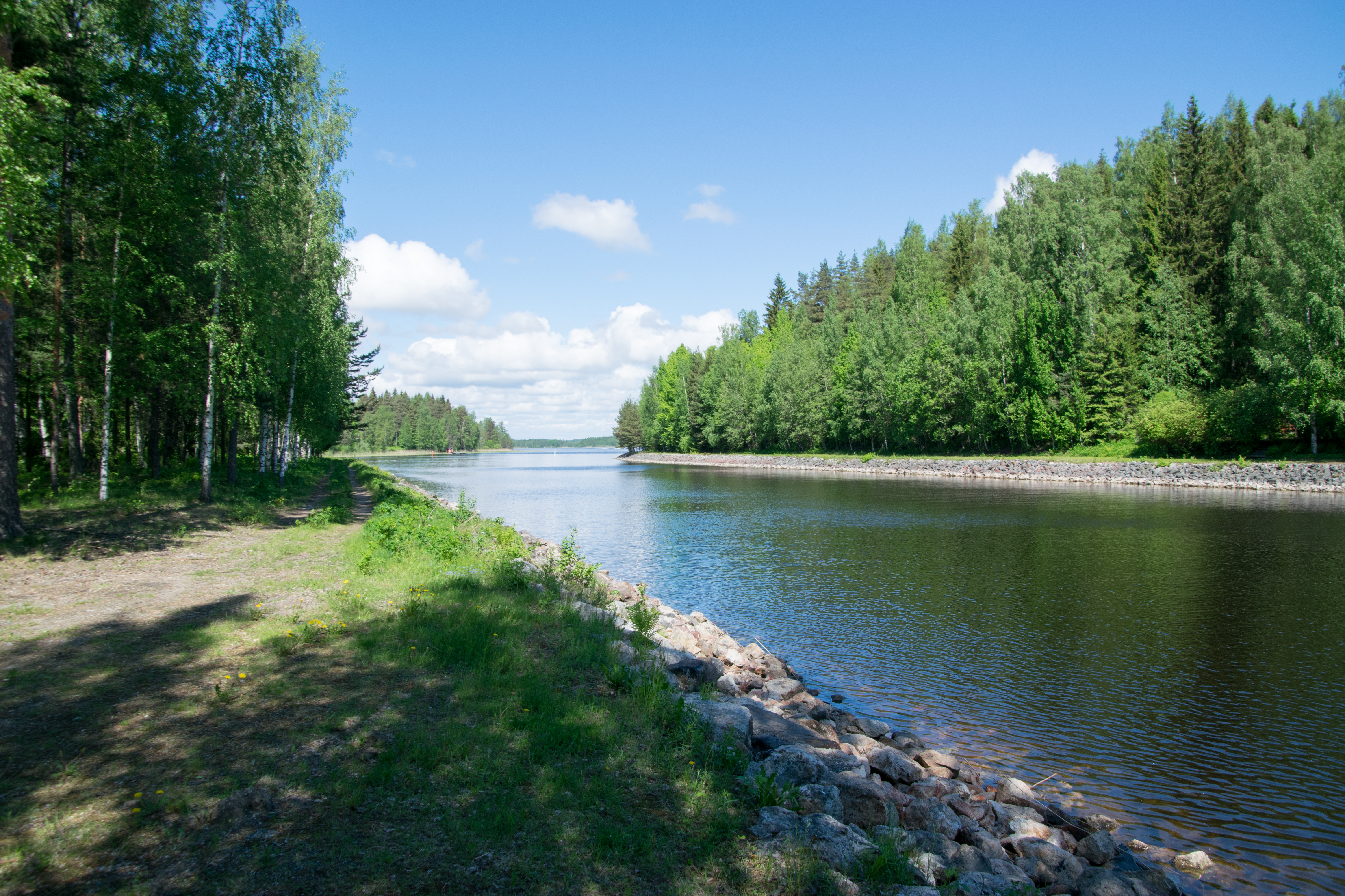 Siikasalmen kanava